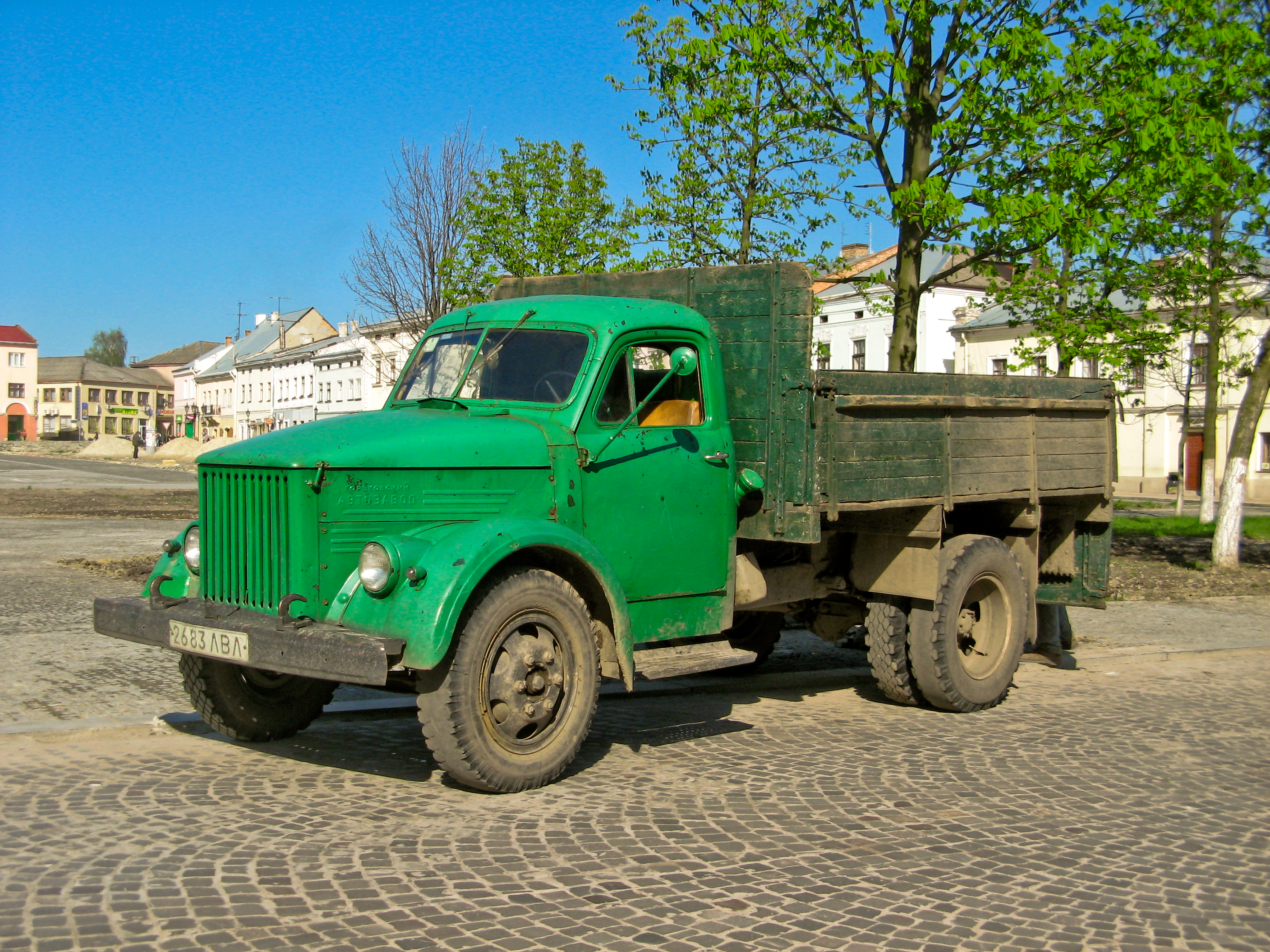 GAZ 51 w Żółkwi